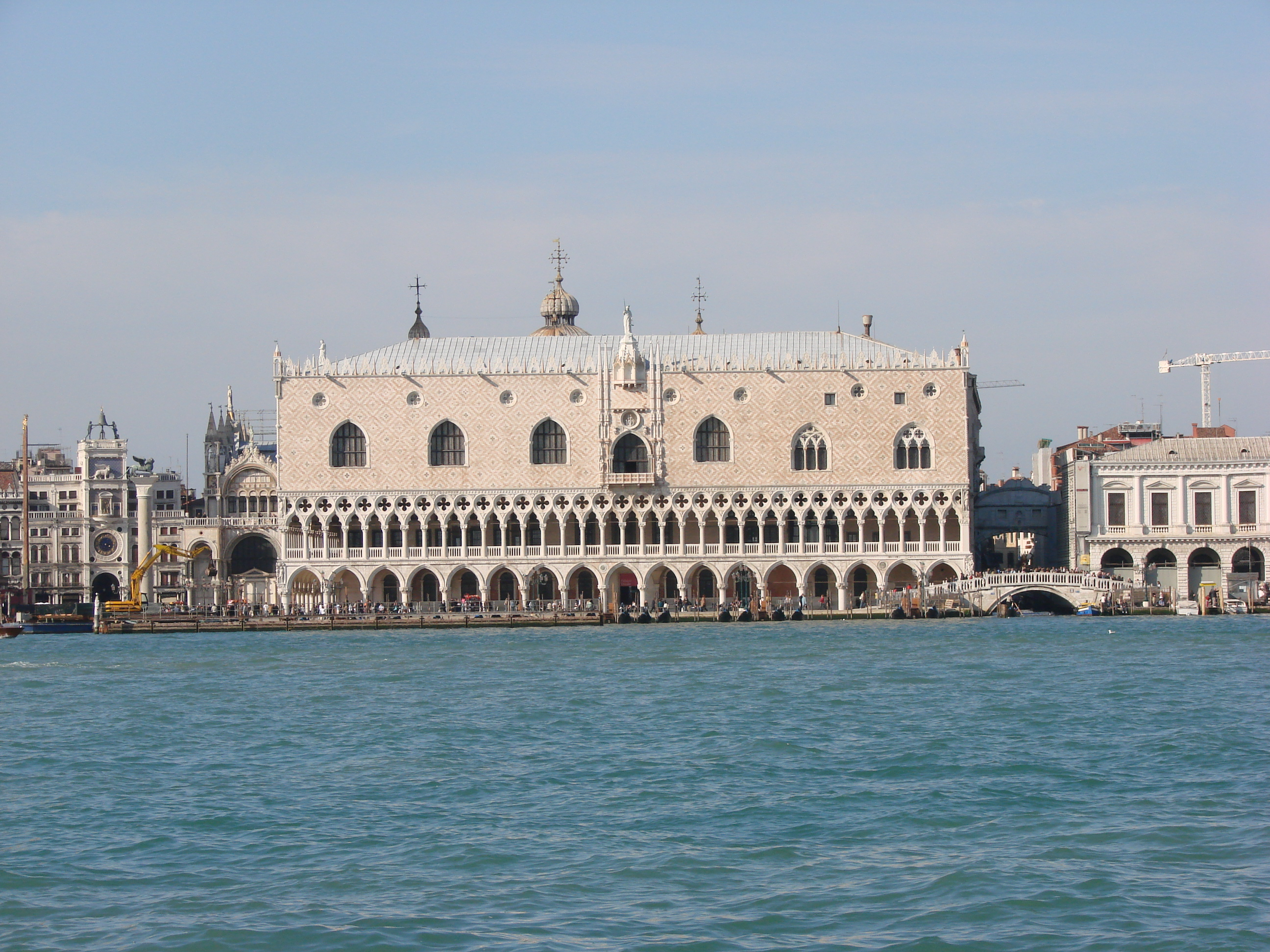 Palazzo Ducale, view from San Giorgio Island